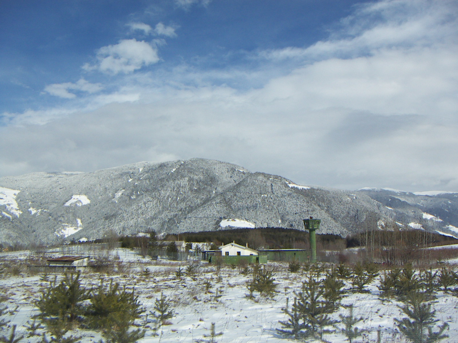 Site Rigel